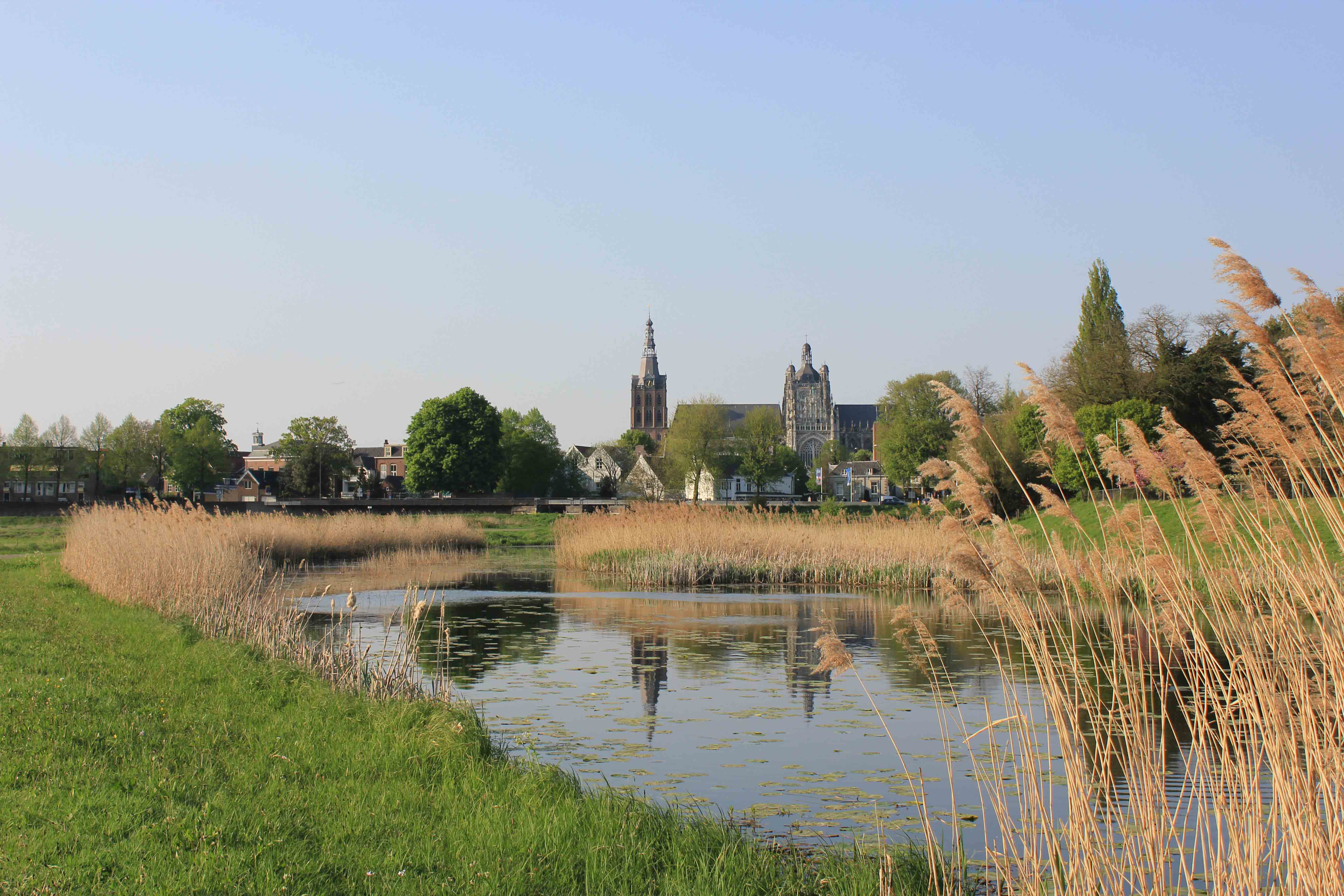 Sint-Jan gefotografeerd vanuit het beschermde natuurgebied Het Bossche Broek